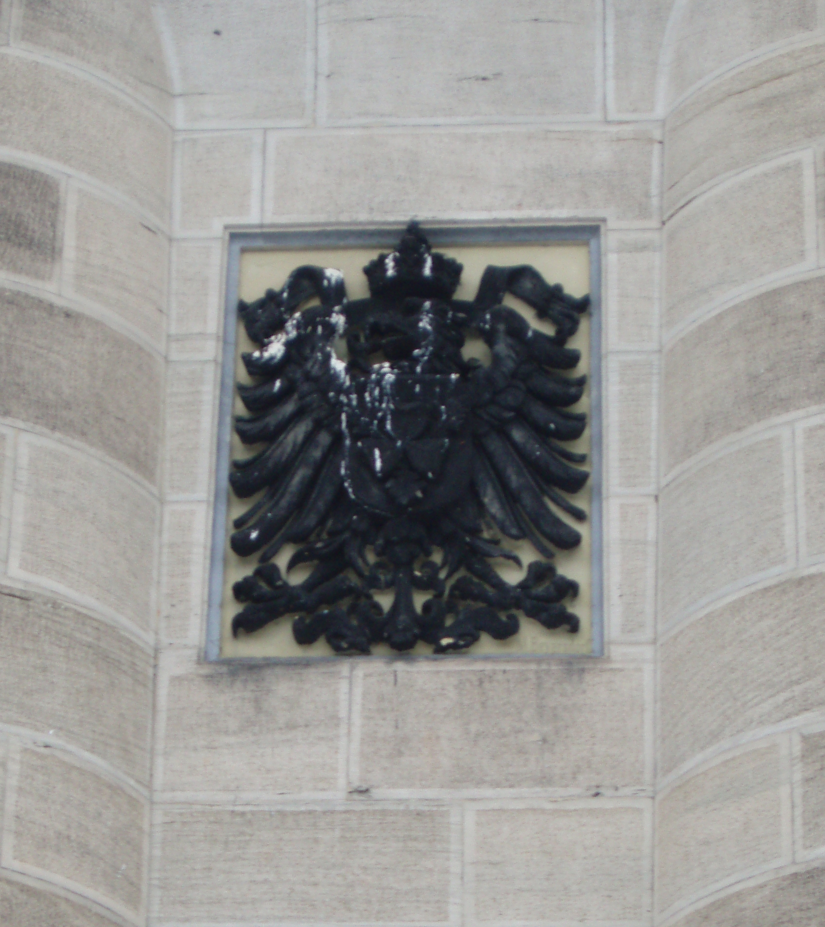 Bismarckturm Coburg, Deutsches Reichswappen (Bronzewappen) auf der Ostseite